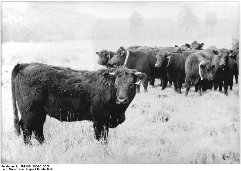 Fischland-Darß, Rinder auf der Weide ADN-ZB Sindermann 15.5.90-pst Bez. Rostock: Neu für die DDR ist die Rinderrasse "Welsh Black", die jetzt mit 20 Färsen vom VEG Zingst auf der Halbinsel Fischland-Darß angesiedelt wurde. Für die Rinder dieser ursprünglich aus Wales und Schottland stammenden Rasse sind hoher Fleischanteil und Genügsamkeit bei der Weidehaltung charakteristisch.